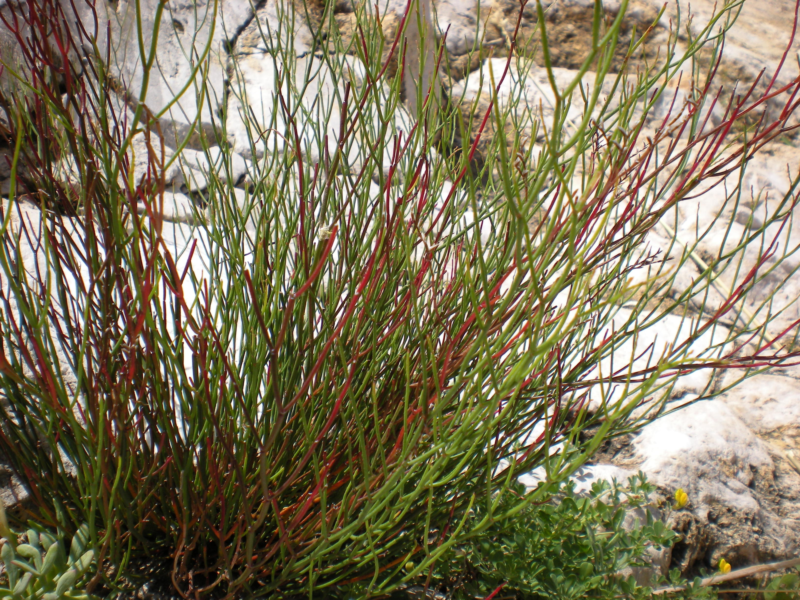 Limonium flagellare Riserva naturale Zingaro, Sicily